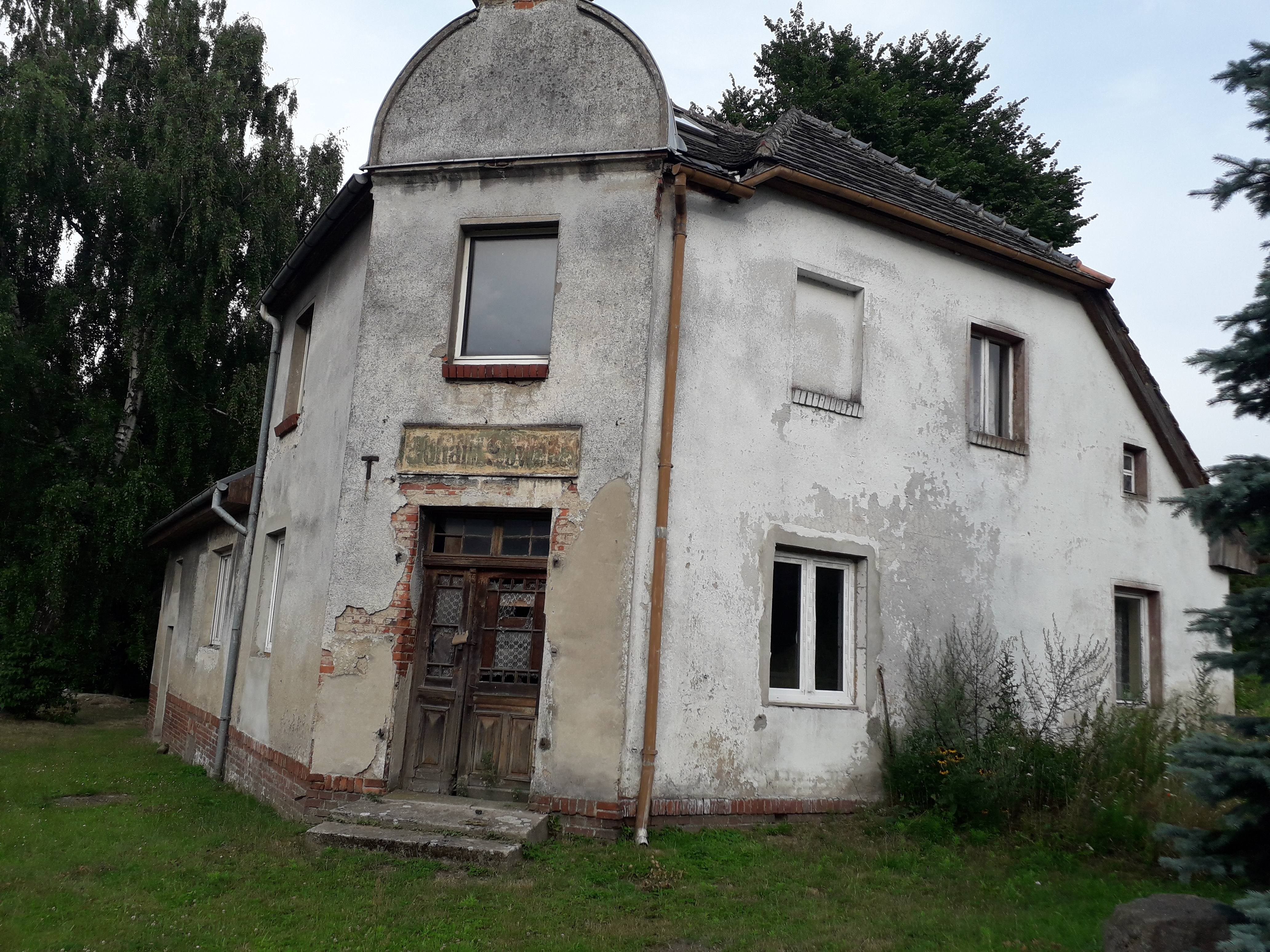 Sklep zbudowany w 1910r.